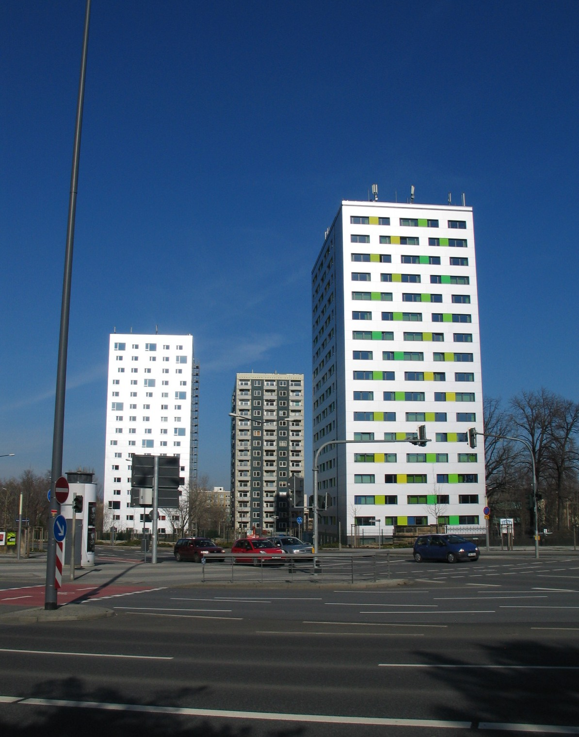 Studentenwohnheime in der Hochschulstraße am Fritz-Foerster-Platz in der Südvorstadt in Dresden